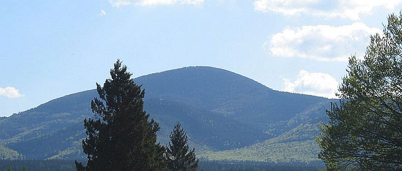 Kopec Ostrý 1044 m při pohledu z Pasek